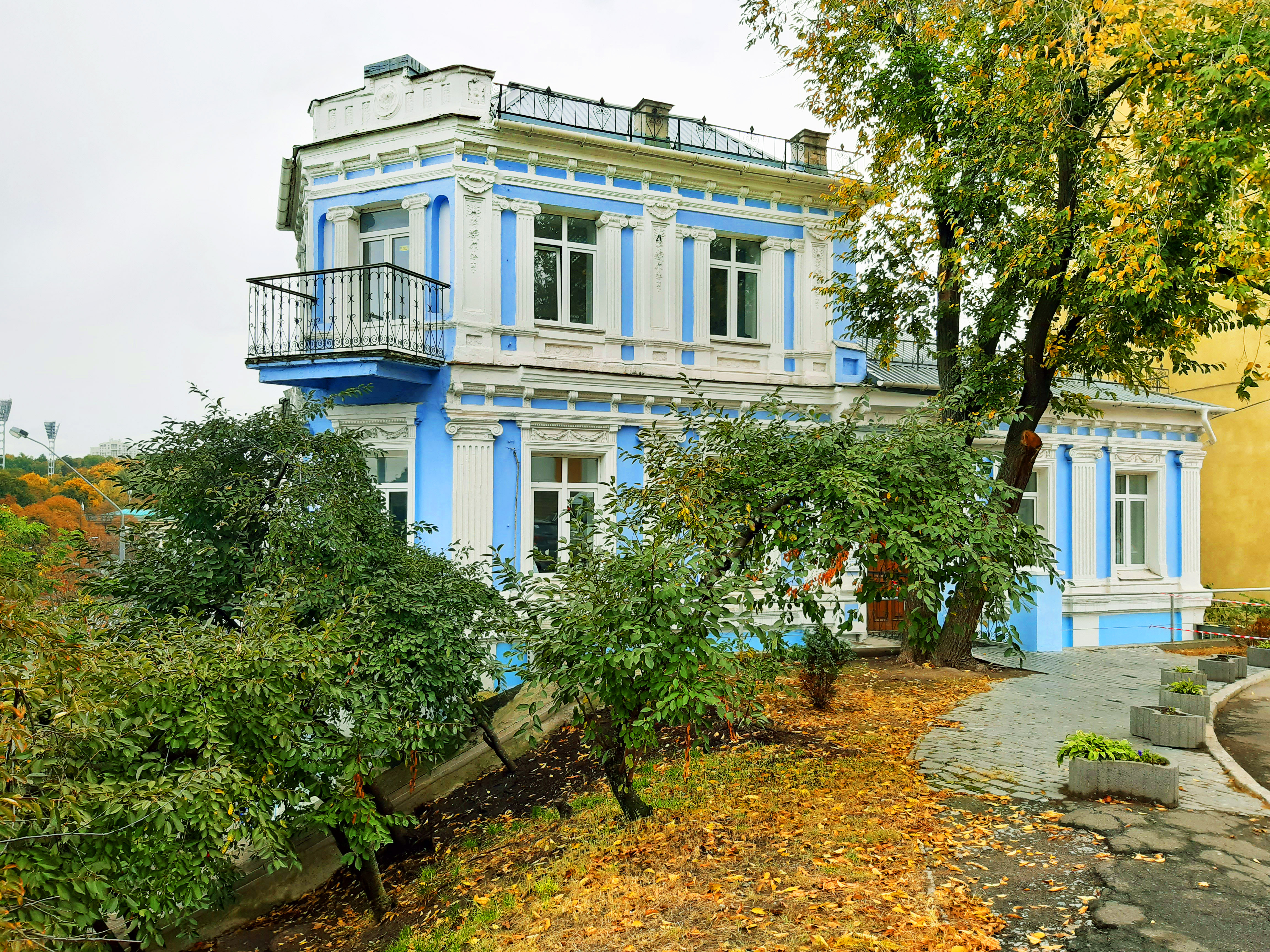 Особняк купця Давида Трахтенберга, Київ, вул. Трьохсвятительська, 5/1